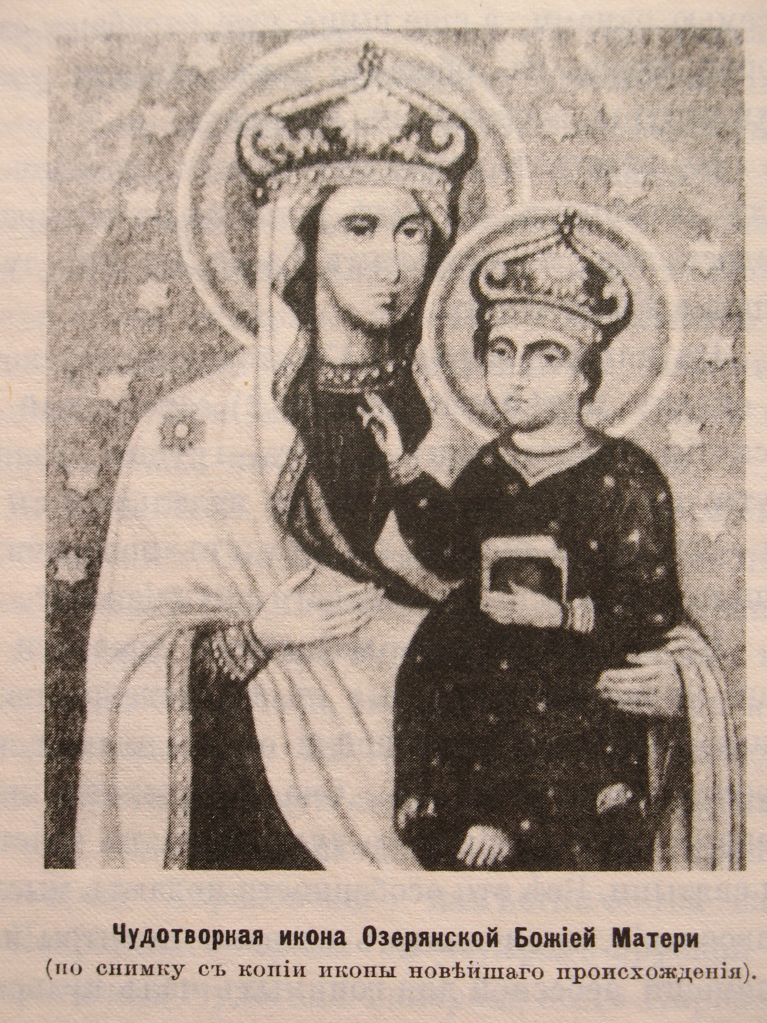 Озерянская икона. Отреставрированный новый список из книги «История города Харькова за 250 лет его существования (с 1655 по 1905-й год)» Д.И. Багалея, Д.П. Миллера. 1 том.